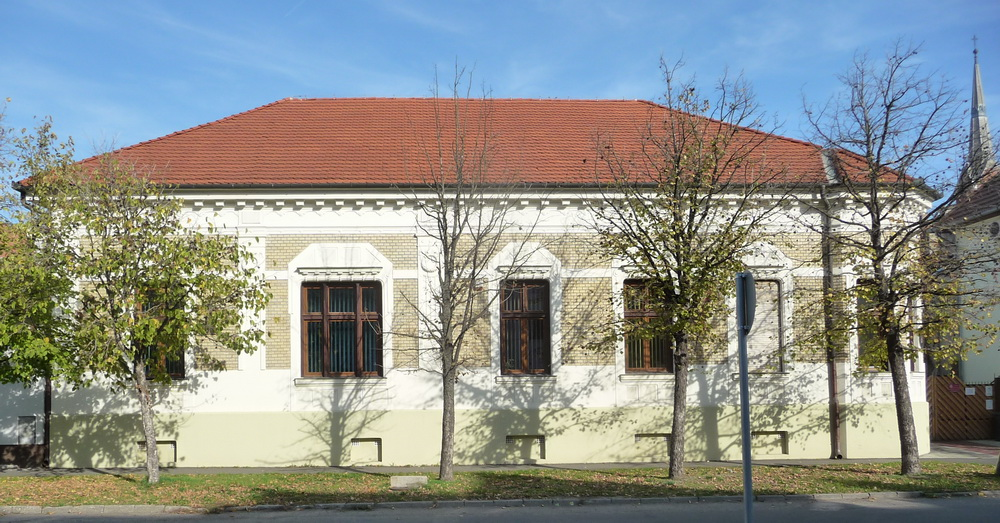 Bankó András egykori lakóháza Békéscsabán, ma a Békés Megyei Kormányhivatal Földhivatalának épülete